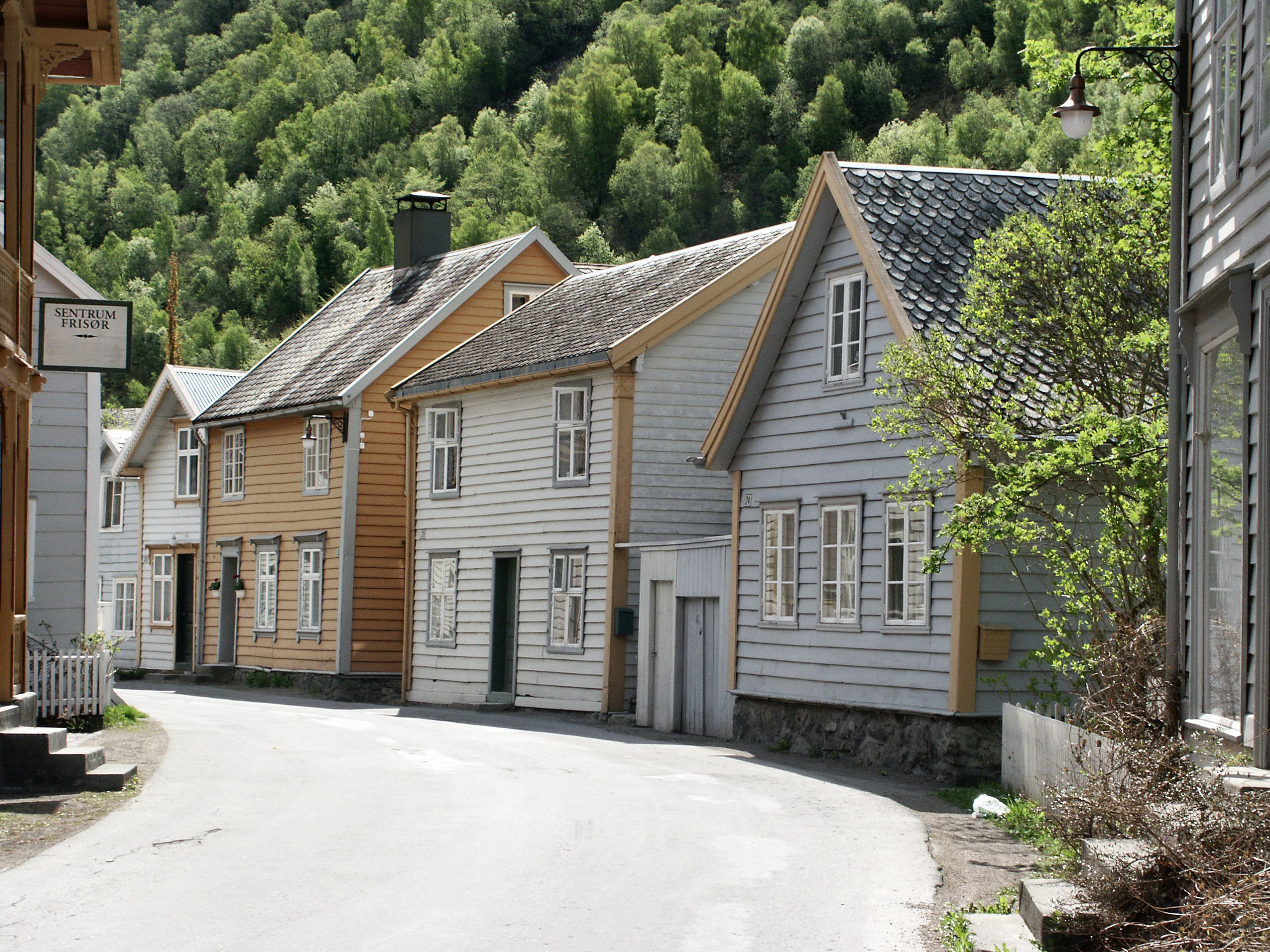 Laerdalsoeyri, Sognefjord. 1700-houses